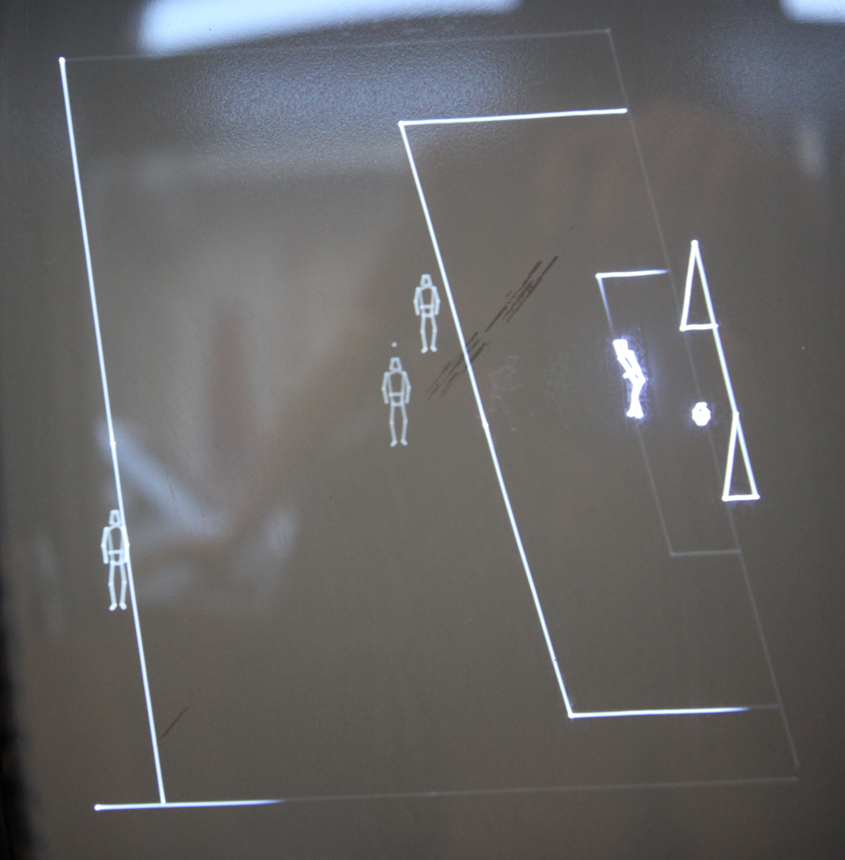 Bildschirm mit Vektorgrafik Vectrex Heads Up Action Soccer Game